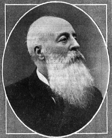 Fotografía del político Alejandro Pidal y Mon publicada en 1912 con motivo de la conferencia que pronunció sobre el retrato de Cervantes.